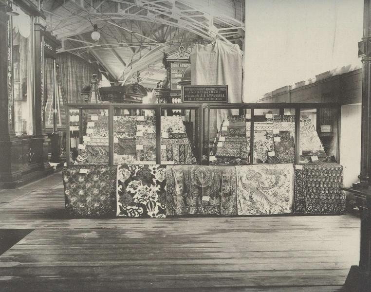 Образцы первобытных Ивановских ситцев с 1691 по 1850 год (Из собрания Д.Г. Бурылина), сфотографировано в промежуток между 28 мая и 1 октября 1896 года в Нижнем Новгороде.